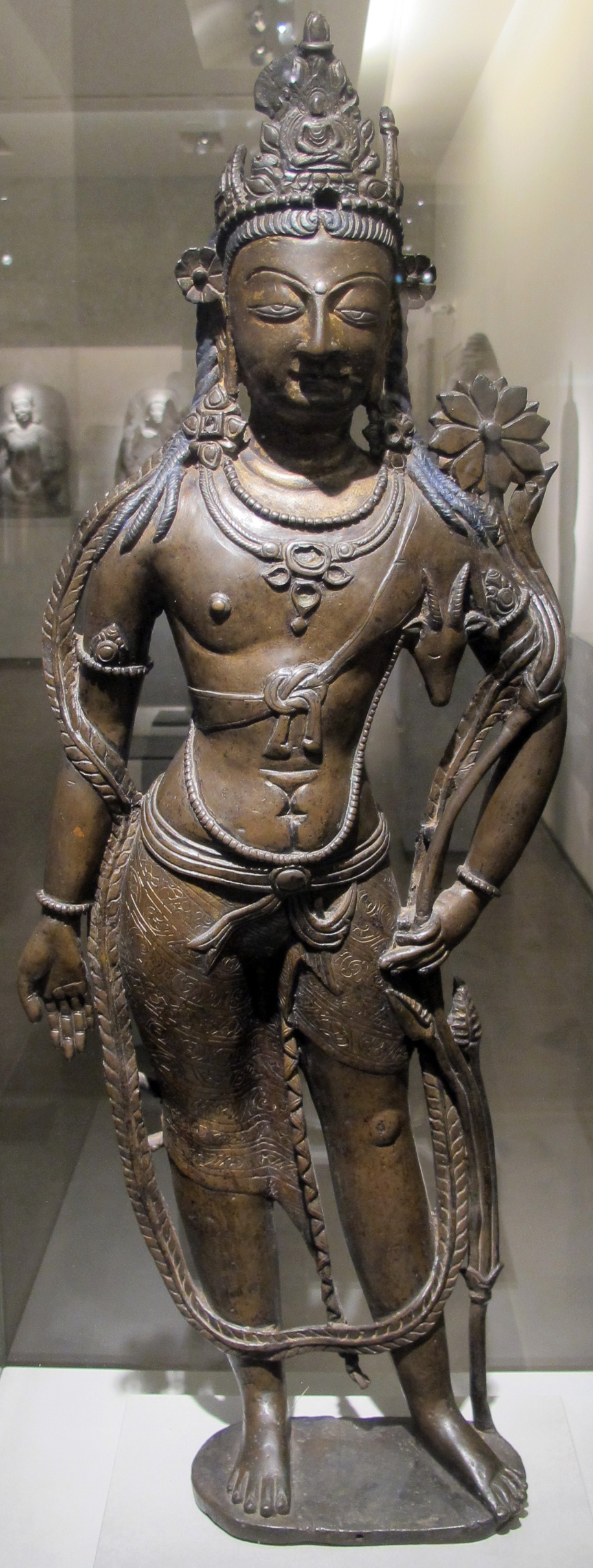 Himalaya occidentale, bodhisattva avalokitesvara, forse da ladakh, X-XI sec